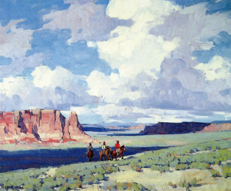 Картины Эдгара Пейна (англ. Edgar Alwin Payne; 1883—1947) — американского художника-импрессиониста